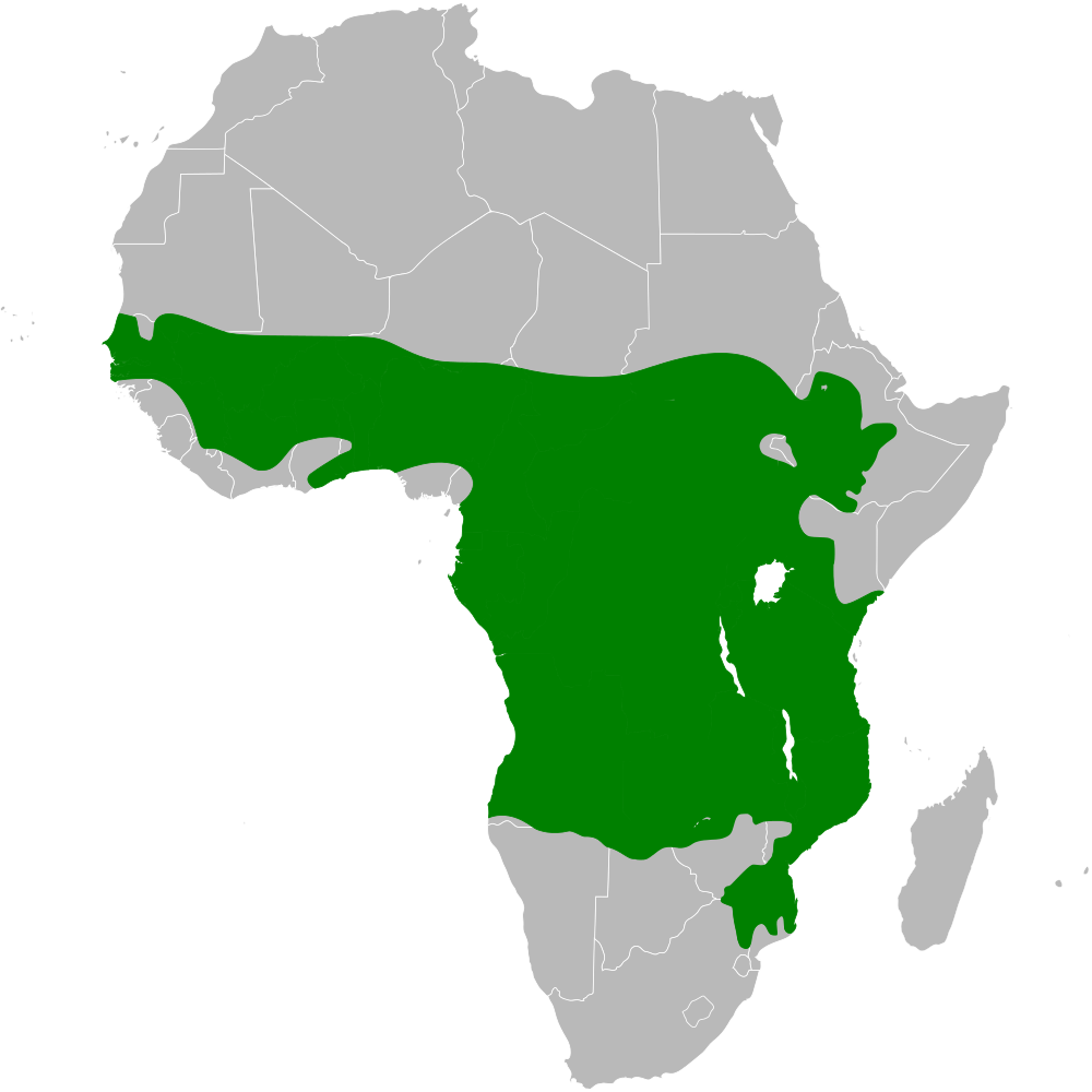 Cecropis senegalensis distribution map, based on